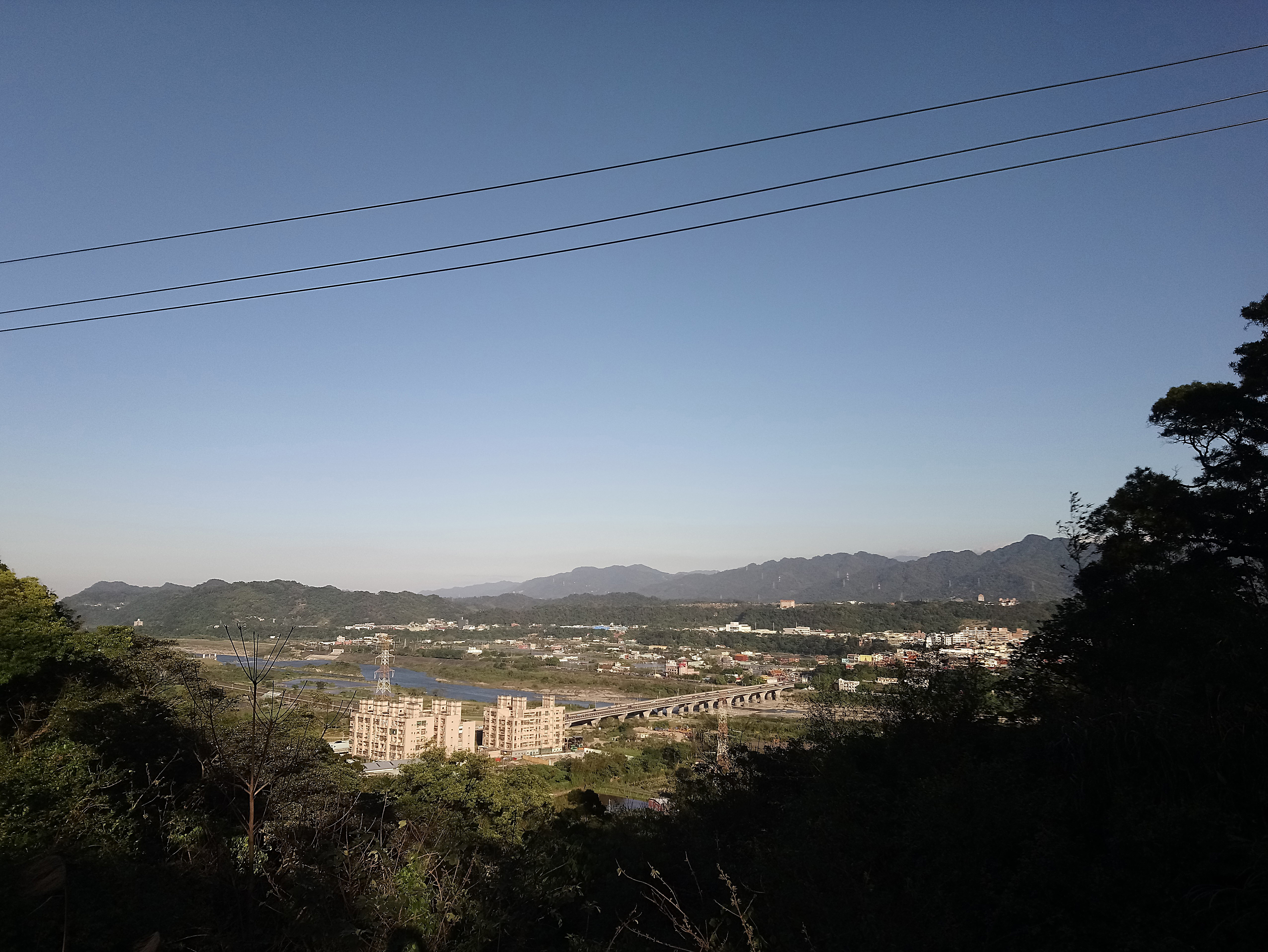 由員樹林看月眉（左）與大溪（右）,桃園市大溪區光明里